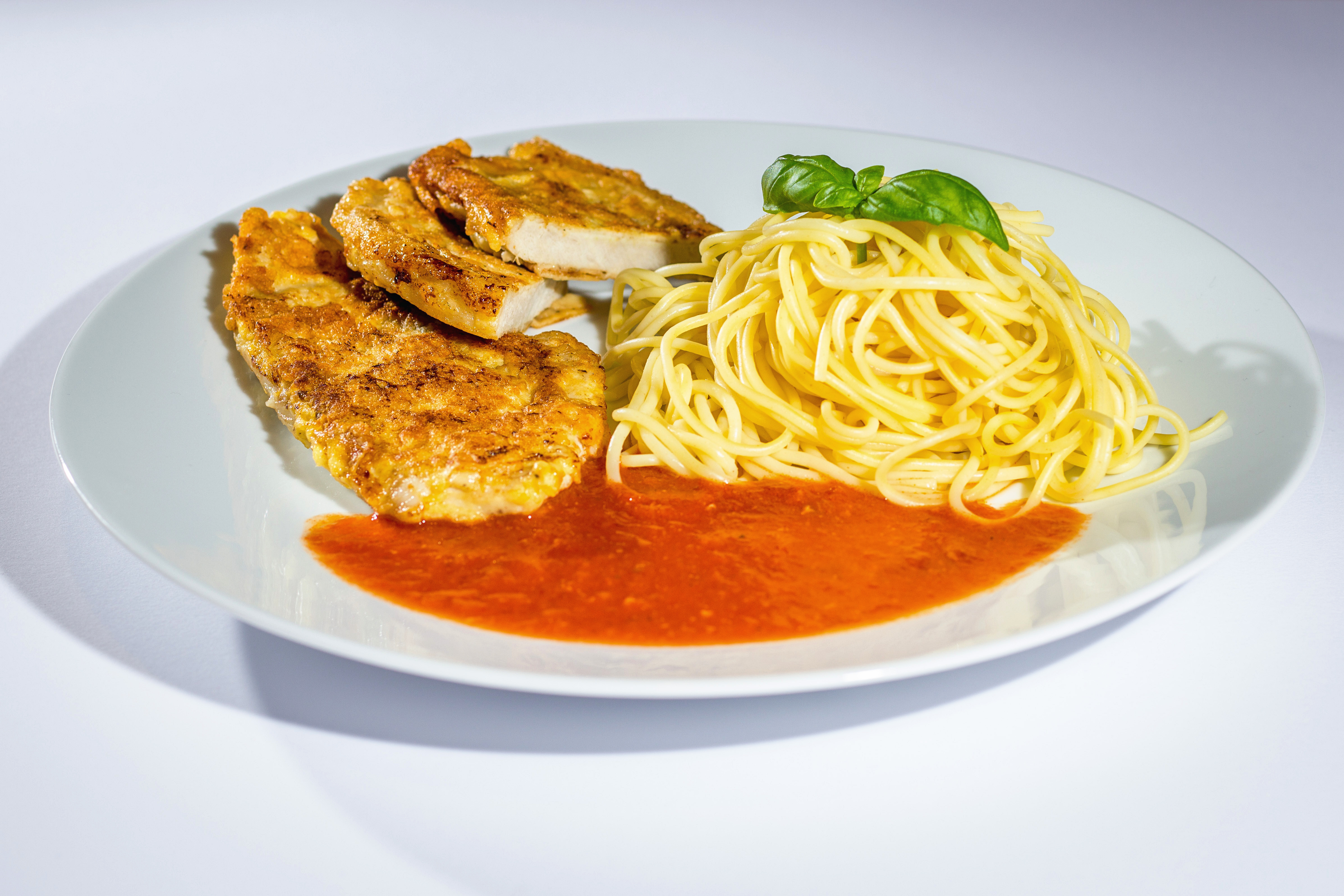 Piccata alla milanese, ein Gericht aus sehr kleinen Kalbsschnitzeln, die mit Mehl, Ei und durchgeriebenem Weißbrot – vermischt mit geriebenem Hartkäse wie Parmesan oder Grana Padano – paniert und in Butter gebraten und mit Tomatensauce serviert werden.